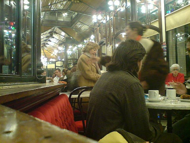 Café gijón - via - Location: Paseo de recoletos, madrid